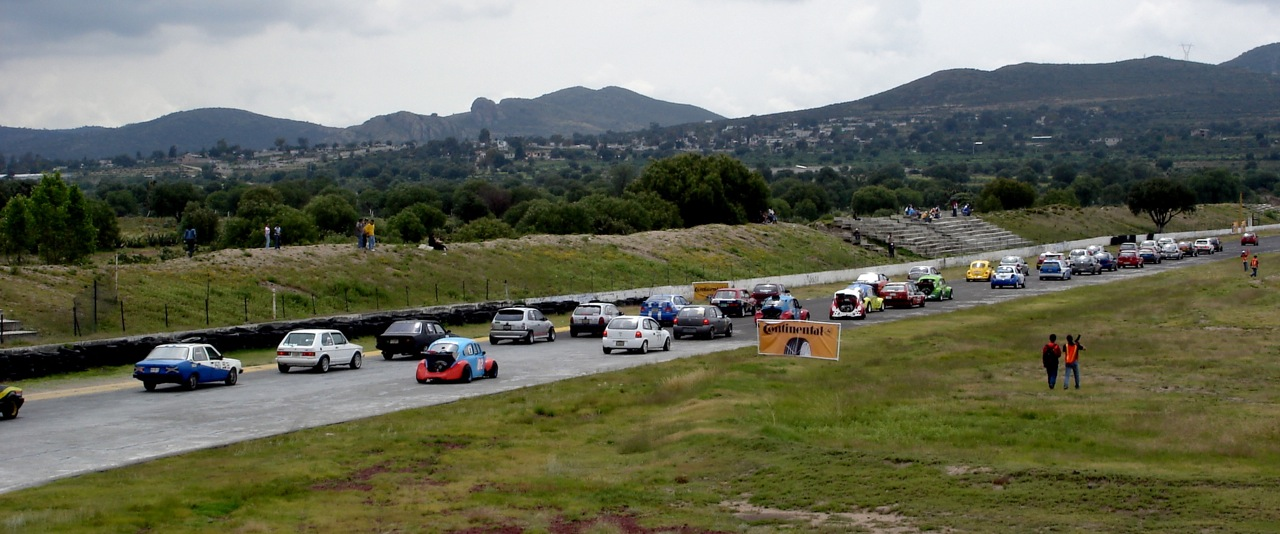 La parrilla listos para arrancar del Autódromo Moisés Solana de Pachuca.